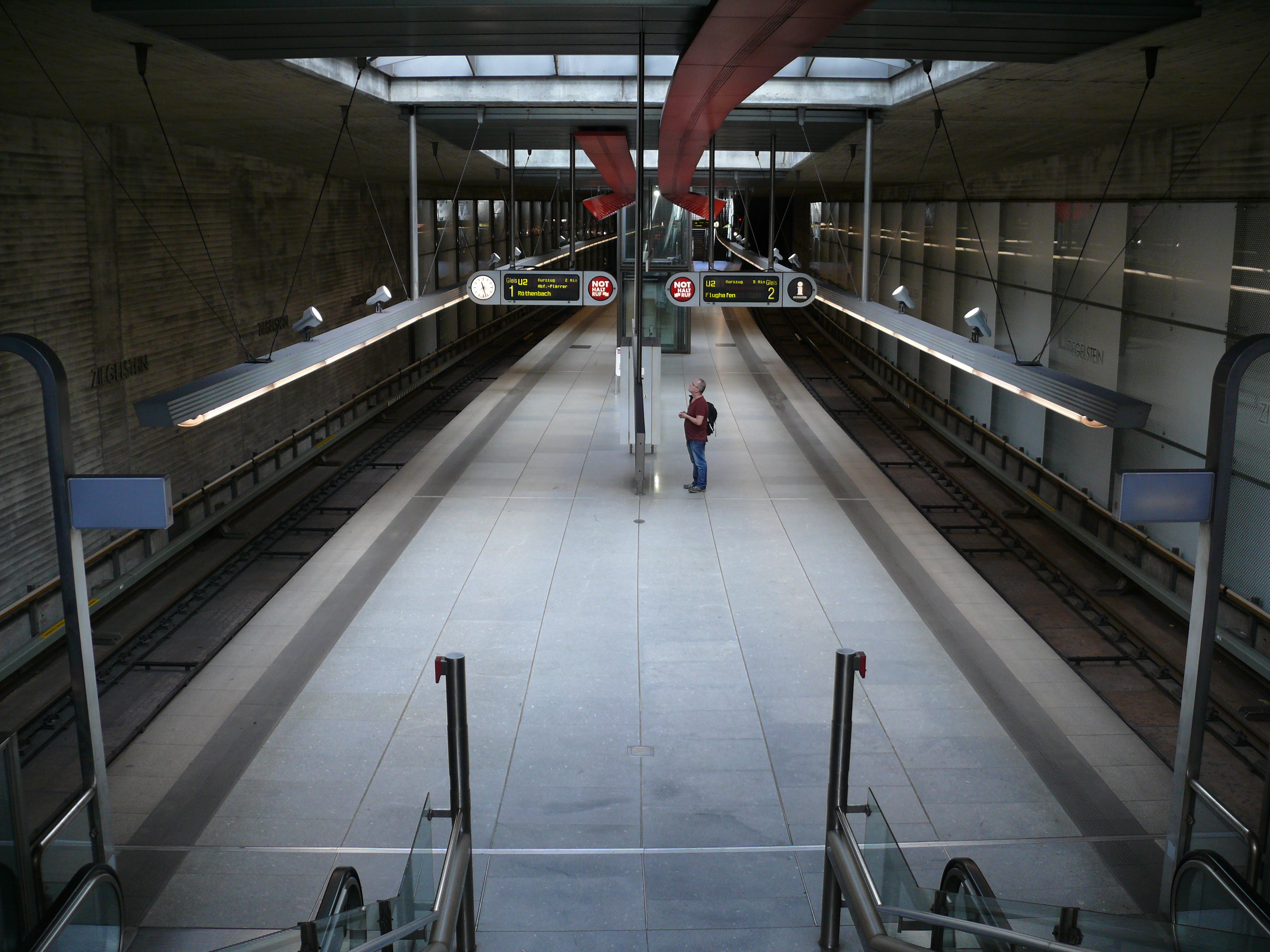 Blick auf die Bahnsteigebene am U-Bahnhof Ziegelstein in Nürnberg.